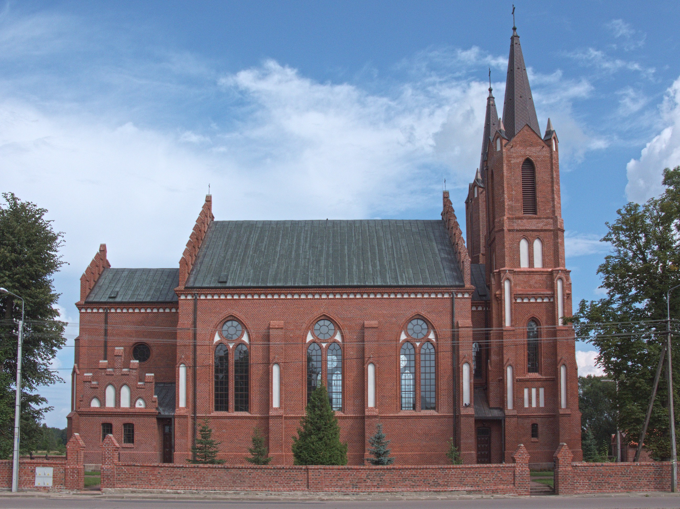 Kościół Wniebowzięcia Najświętszej Maryi Panny w Łubinie Kościelnym.